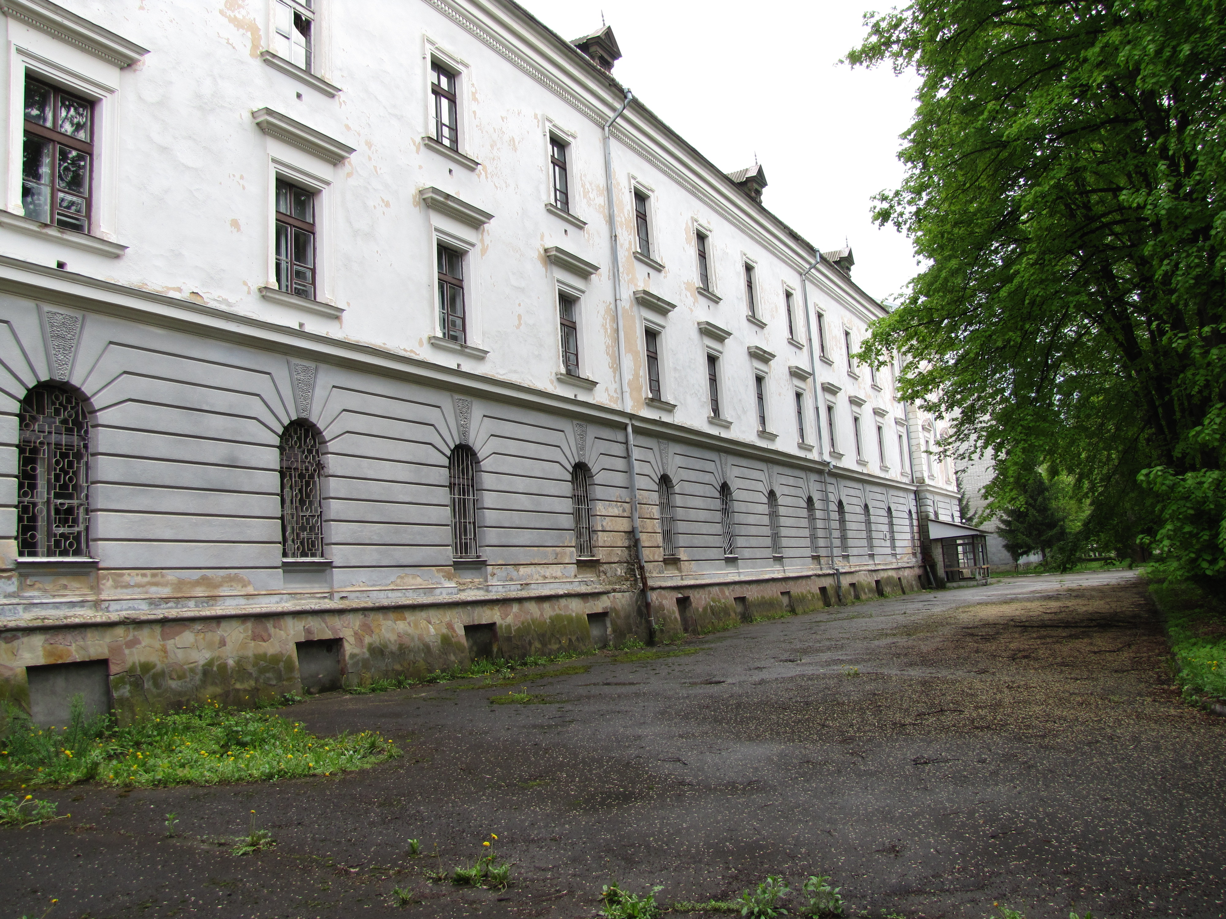 Widok na główną część budynku Collegium Jezuitów